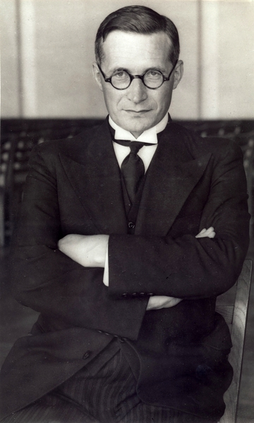 portrett, mann, jurist, professor, sittende halvfigur.